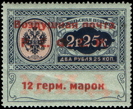 Почтовыя марка СССР. Стандартный выпуск РСФСР.